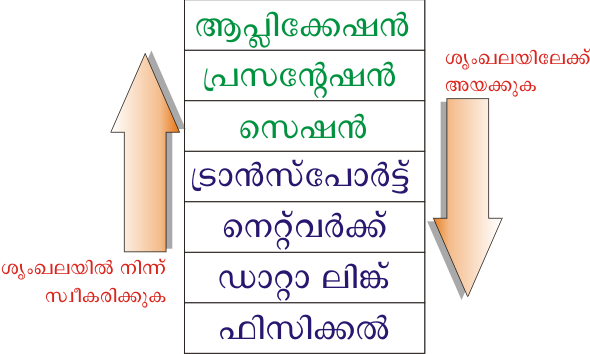 OSI model